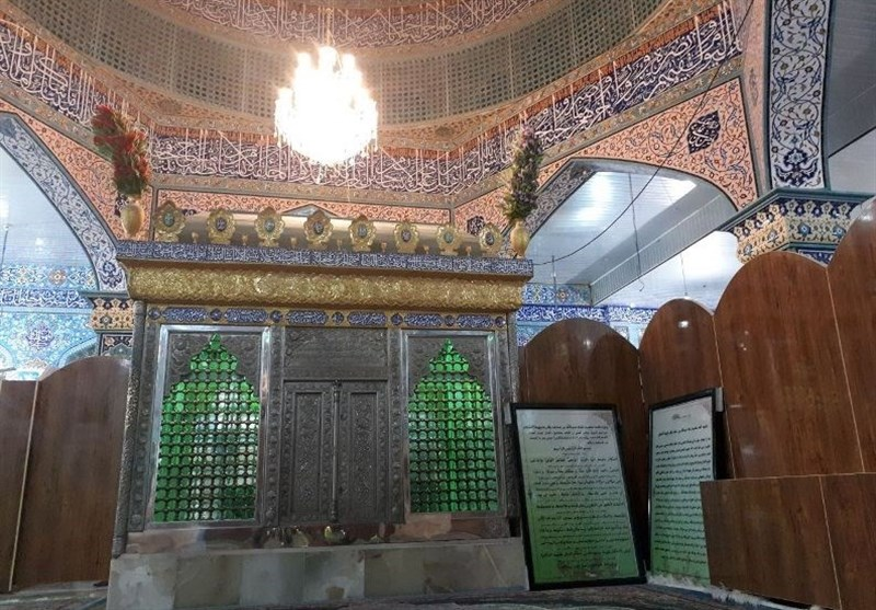 امامزادہ عبداللہ دقدق ضریح